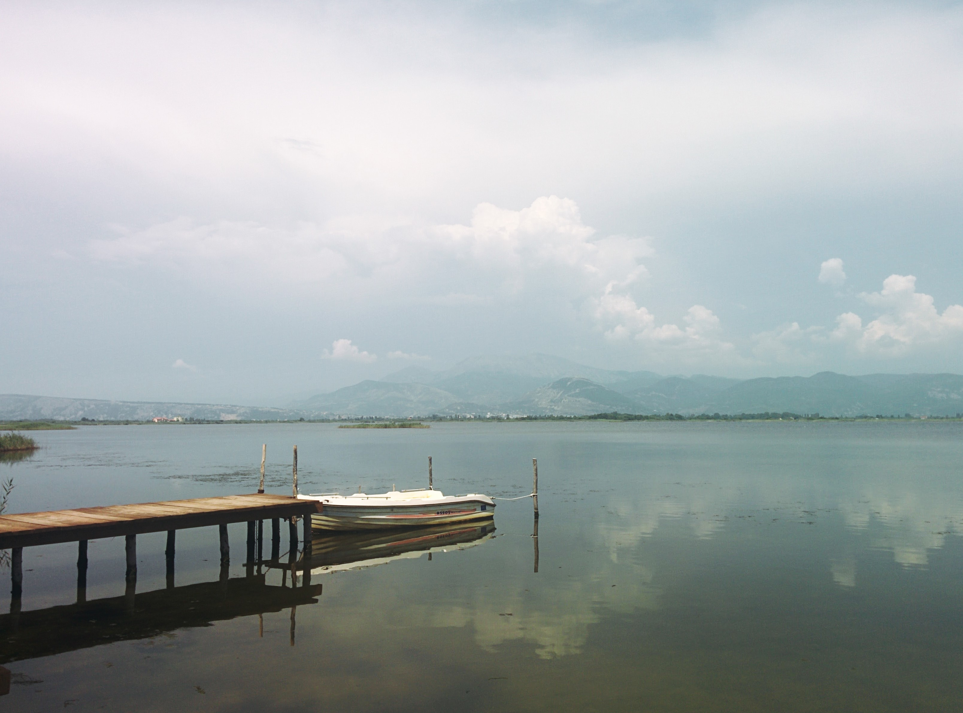 Kune-Vain-Tale, Lezhë